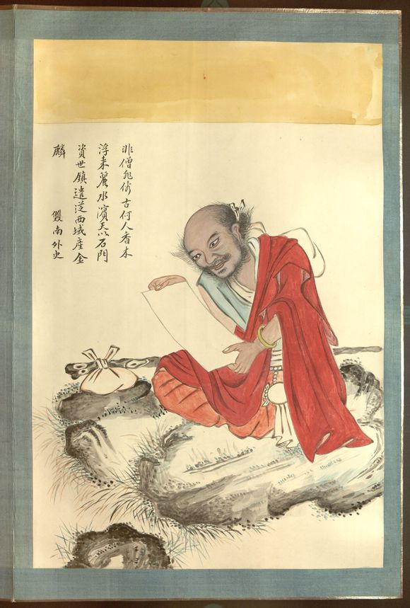 爷爷，丽江土司牟保阿琮的父亲。